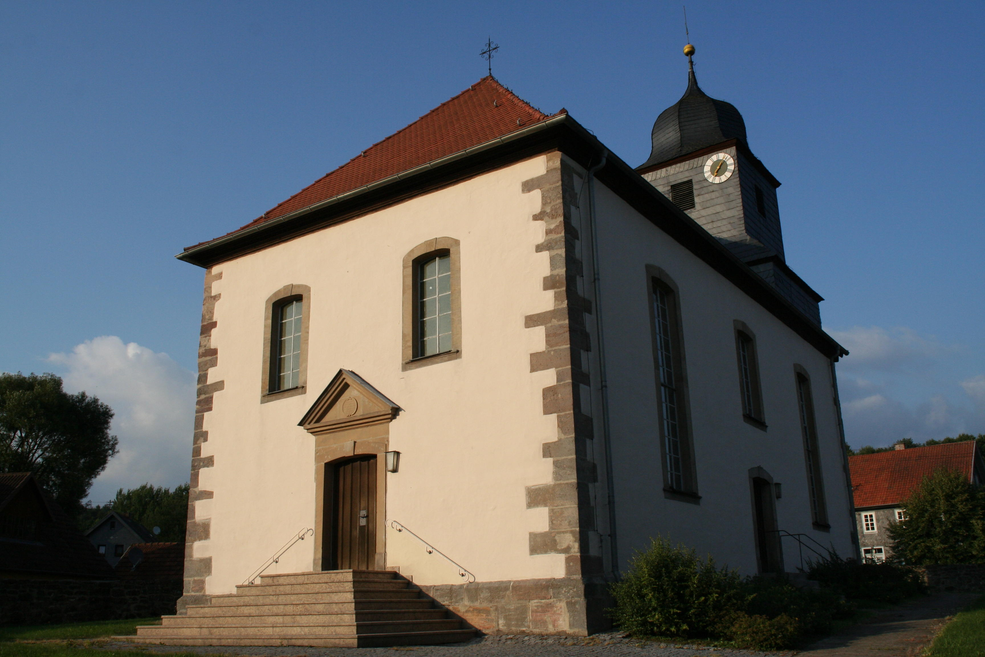 Evangelische Pfarrkirche St. Matthäus in Rottenbach, Landkreis Coburg